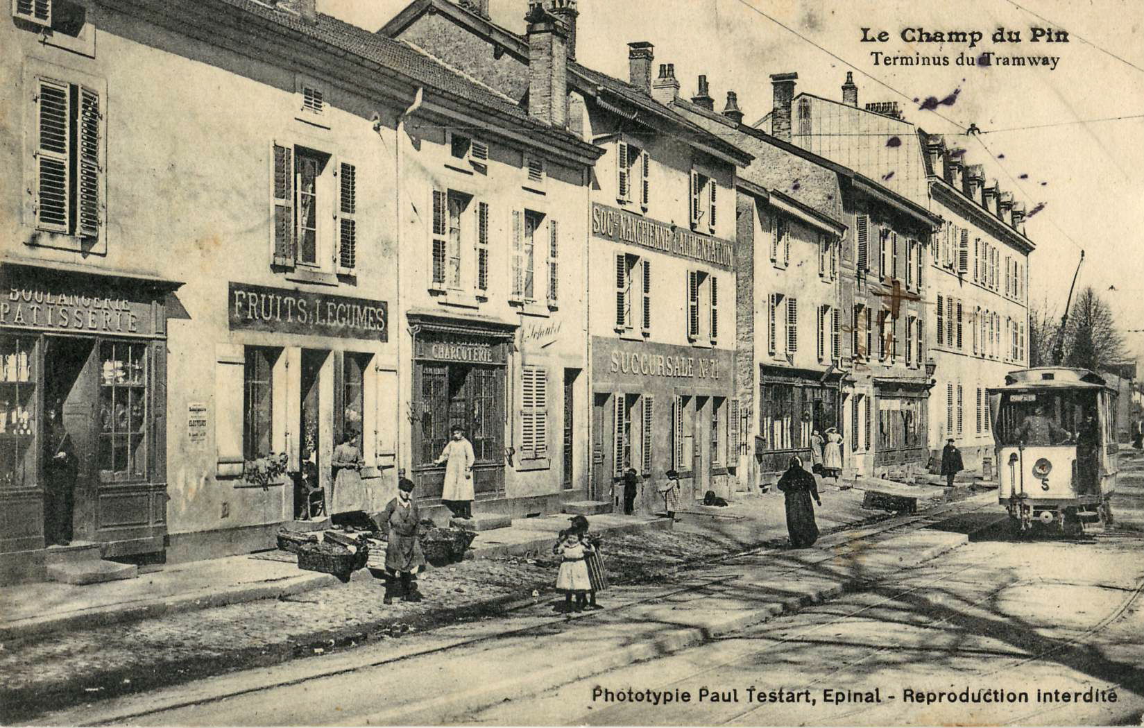 Carte postale ancienne éditée par Phototypie Paul Testart à Épinal : (ÉPINAL) Le Champ du Pin - Terminus du Tramway